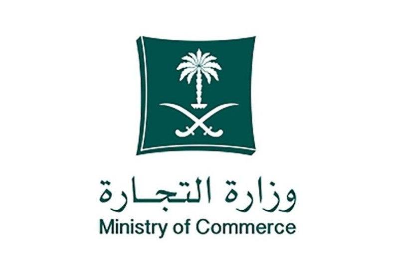 وزارة التجارة